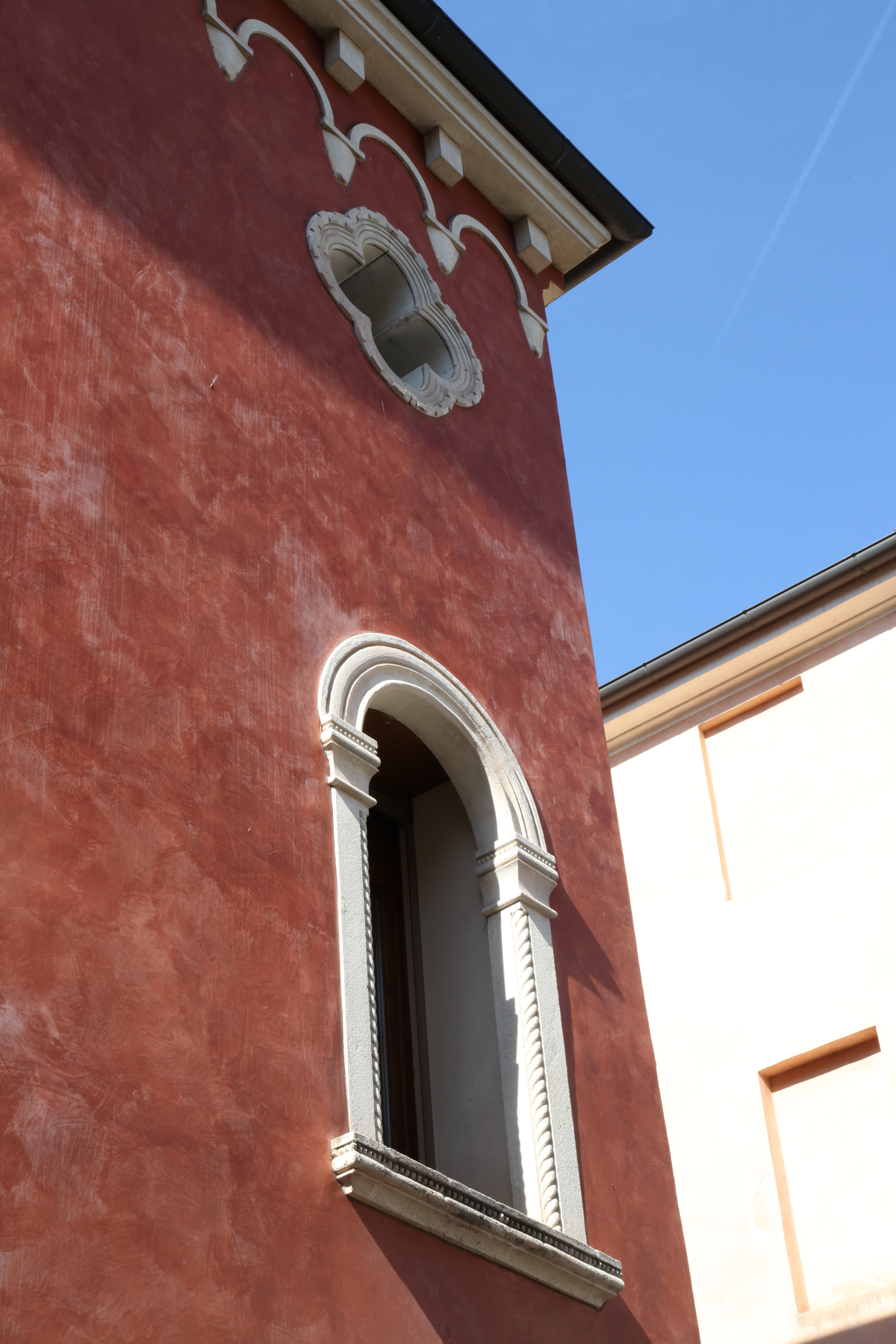 Biblioteca Civica R. Bortoli This is a photo of a monument which is part of cultural heritage of Italy.